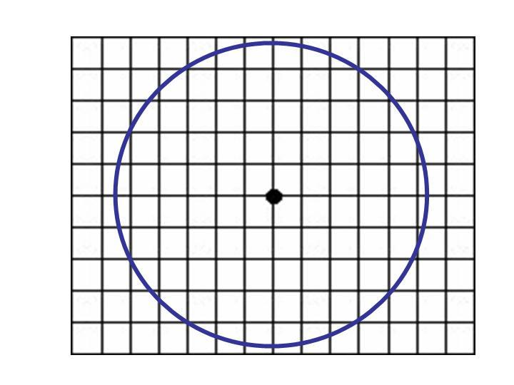 Circulo 001 TT